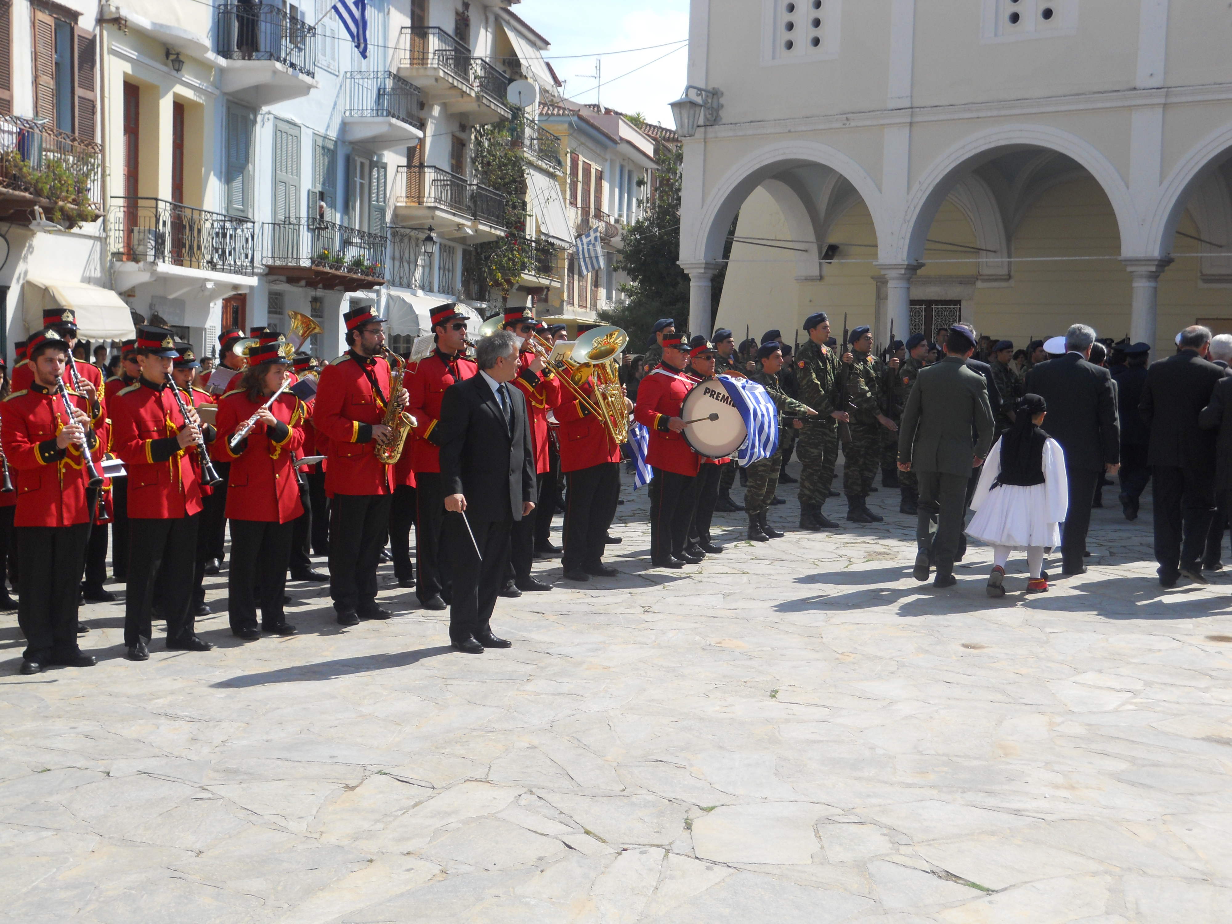 Greek Independence Day